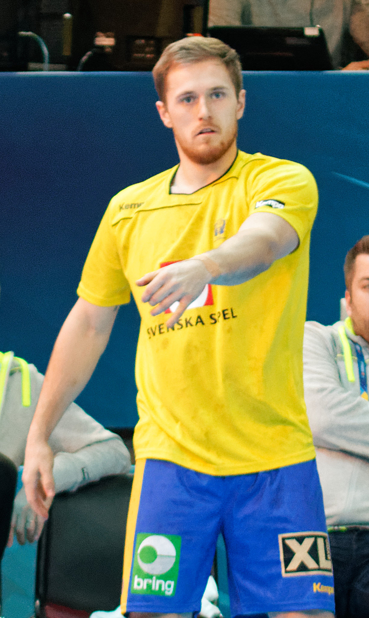 Match de la phase préliminaire du championnat du monde masculin de handball 2017 entre la Suède et le Danemark (Groupe D). A Bercy, le 16 janvier 2017.